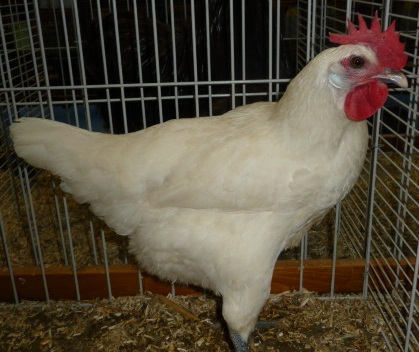 Poule Bresse-Gauloise blanche